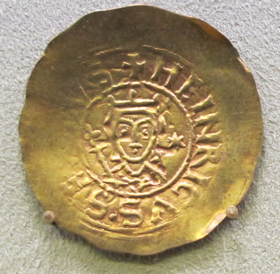 Sicilia, enrico VI, tari, 1194-1197